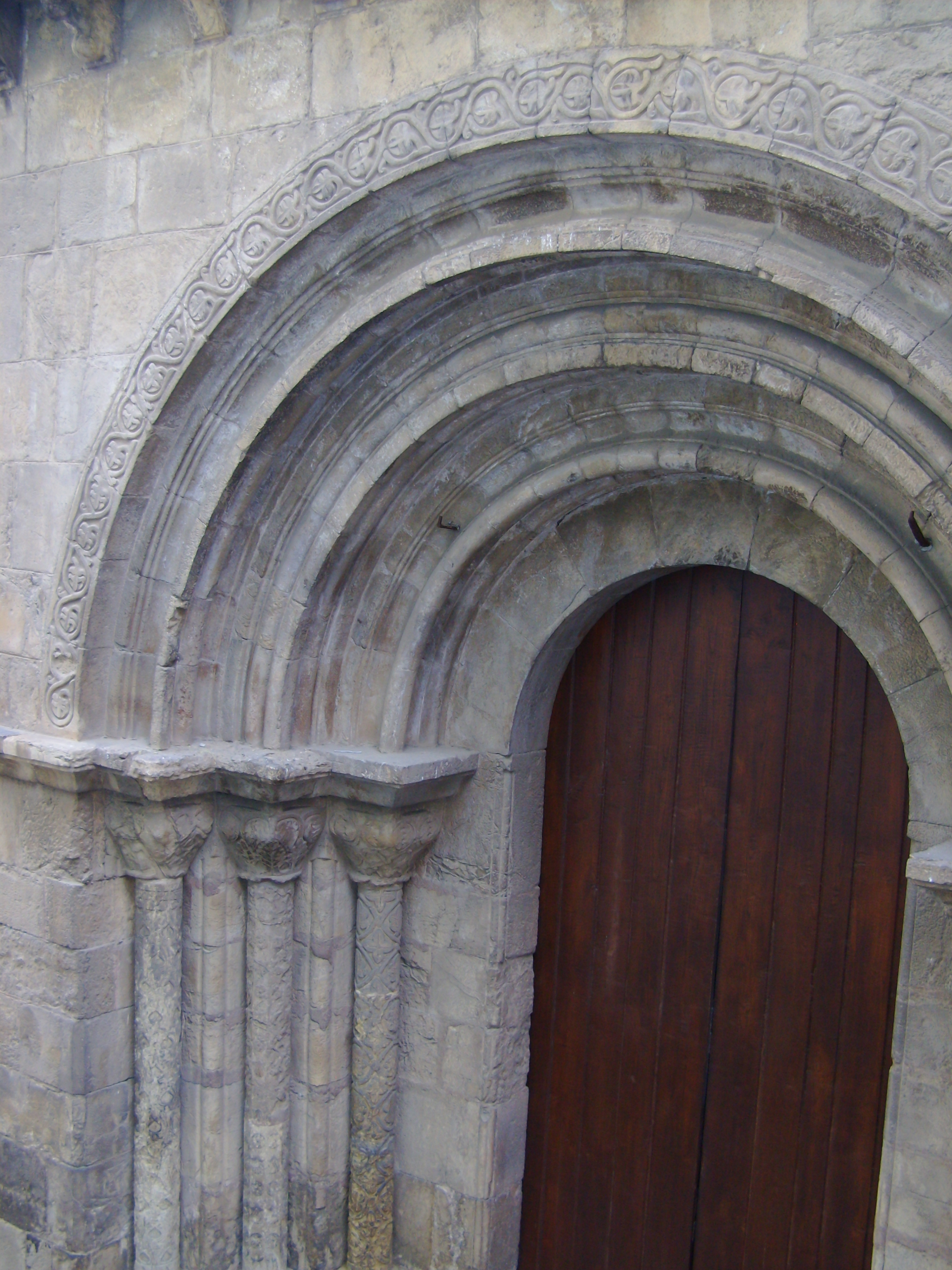 Igreja de Santiago, Praça do Comércio, freguesia de São Bartolomeu, cidade e Distrito de Coimbra, Portugal.